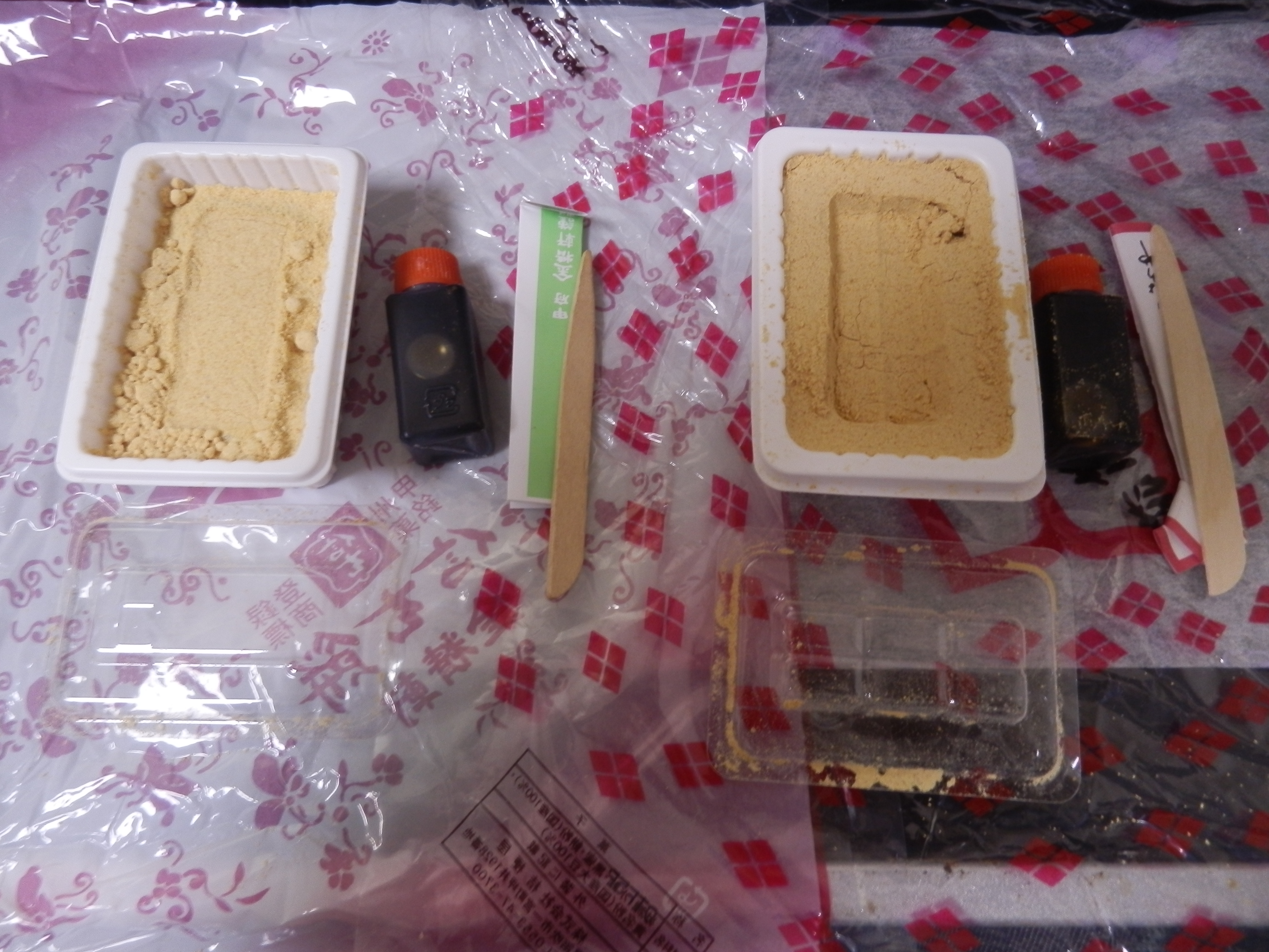 信玄餅（左）と桔梗信玄餅（右）の比較